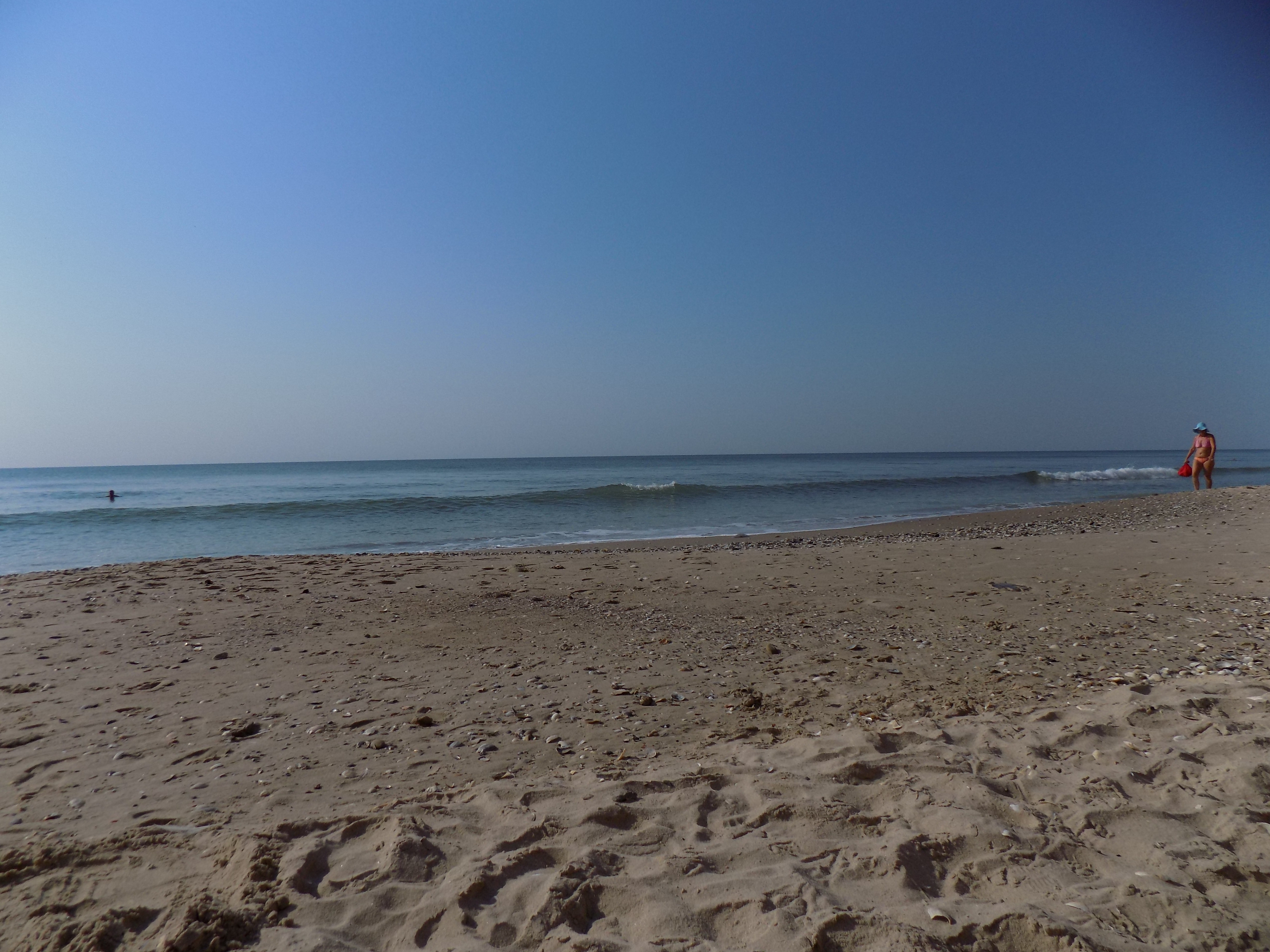 Tatarbunars'kyi district, Odessa Oblast, Ukraine